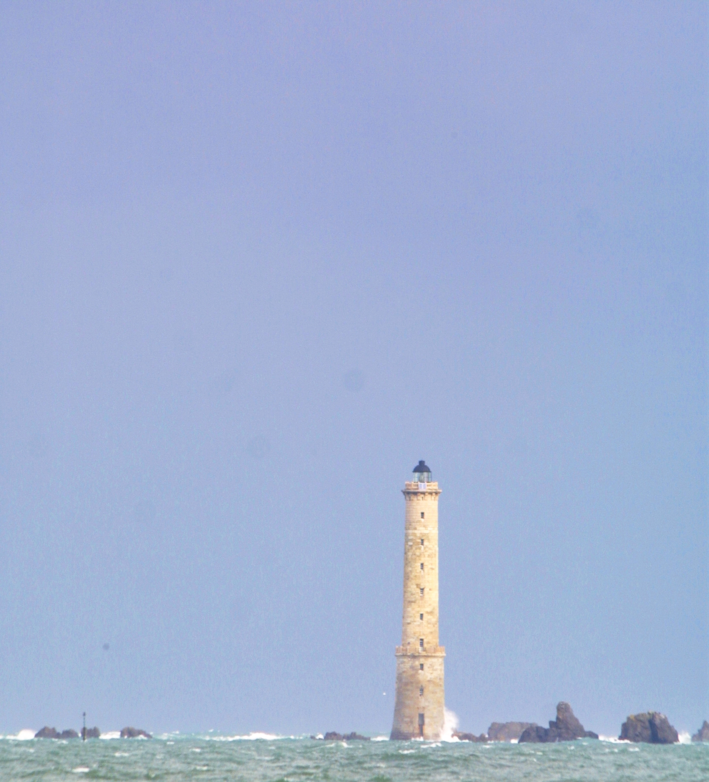 Auteur : Patrick Maire